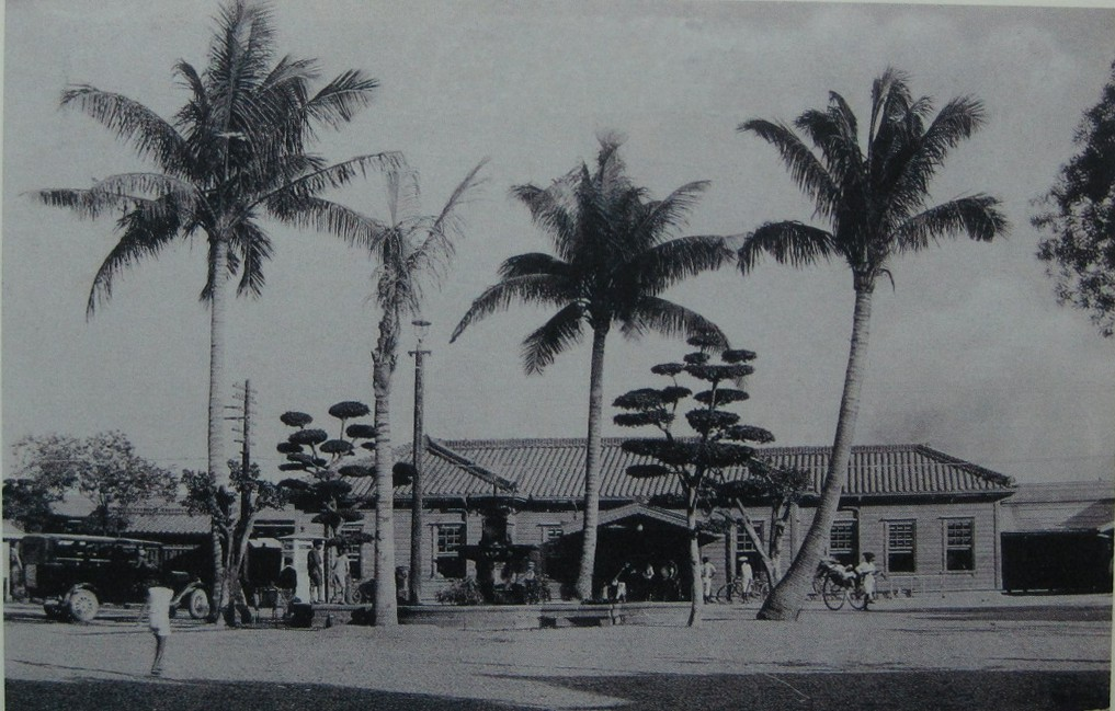 第一代高雄驛，後來的高雄港車站前身